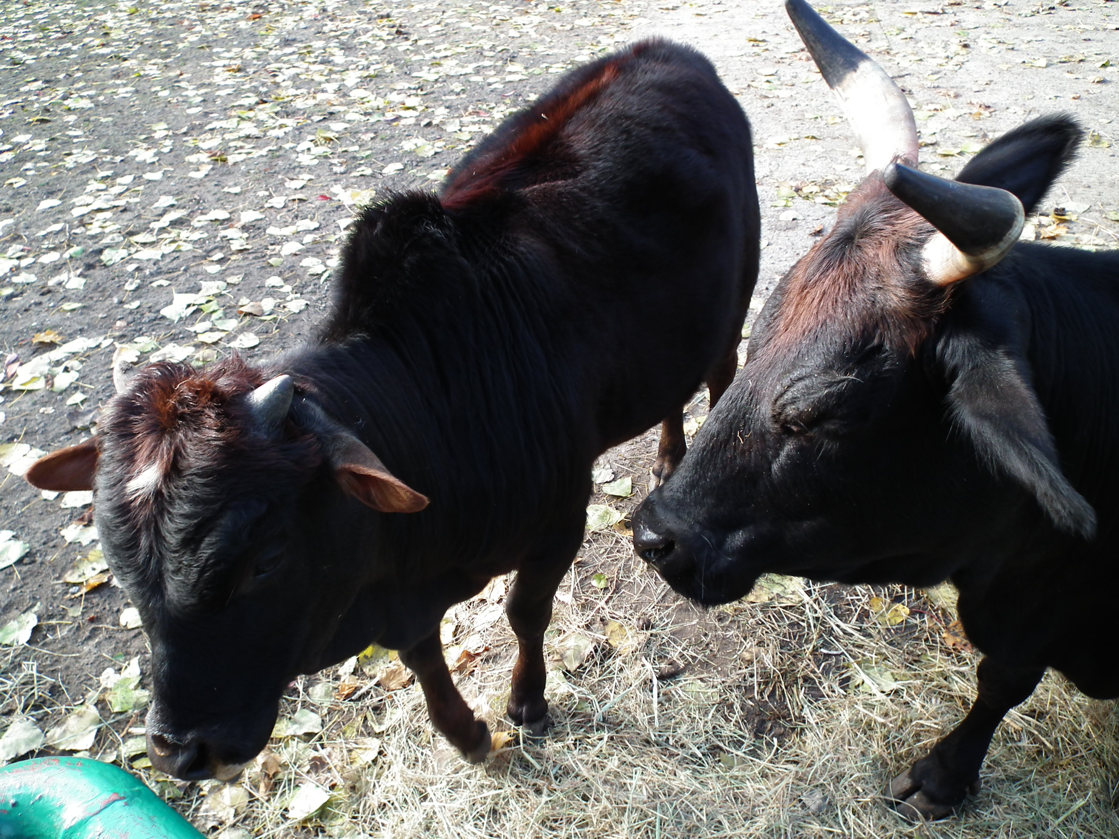 Zebu w St. ZOO w Poznaniu.